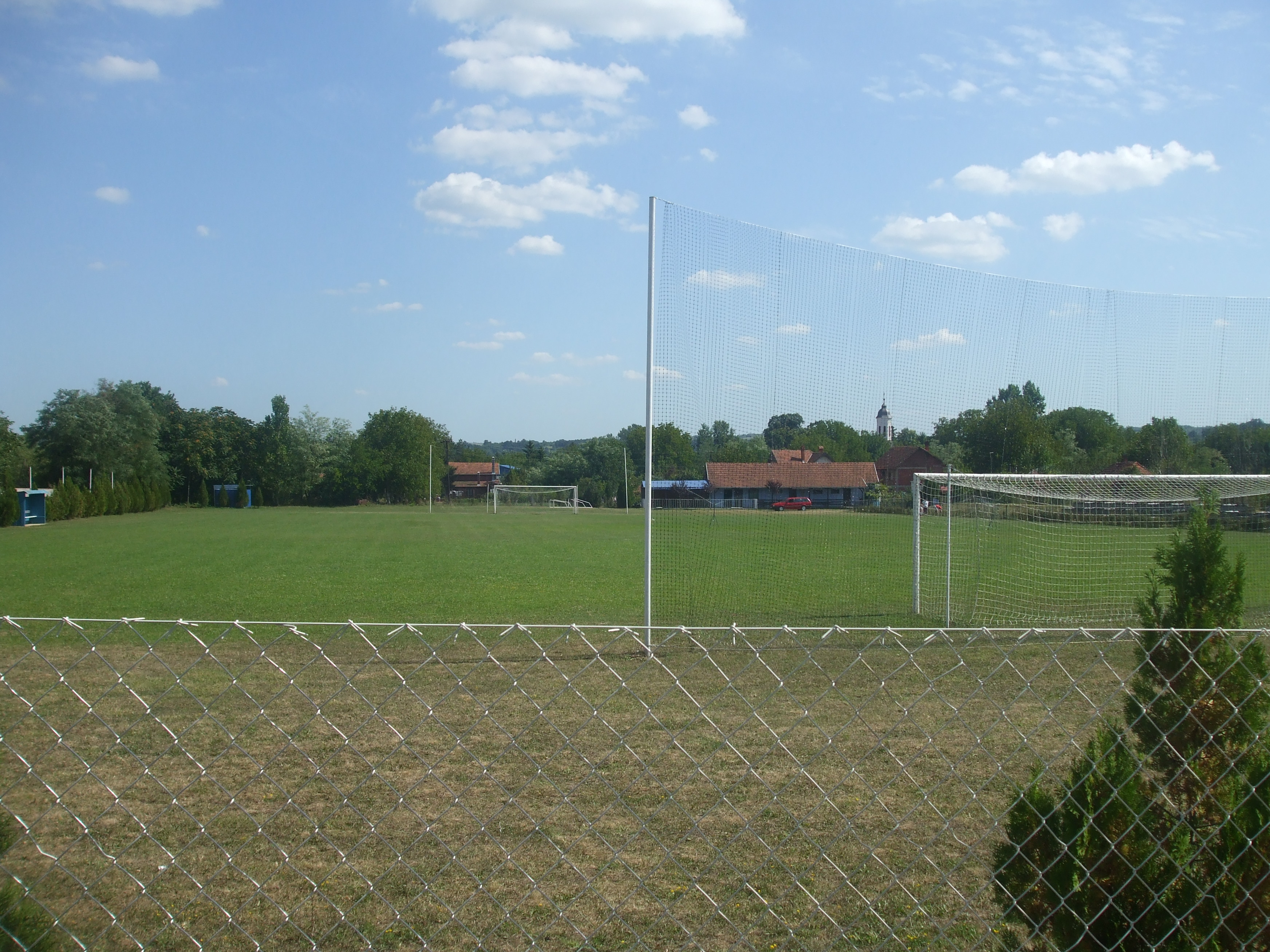 Терен ФК Шумадинац, Наталинци.